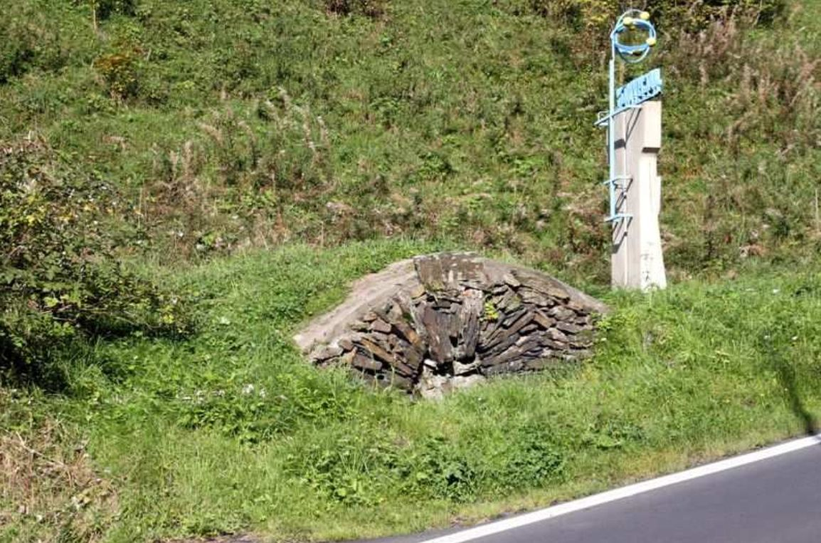 Ústí štoly Leithund, u silnice I/25 z Jáchymova na Boží Dar (tř. Čs. armády), pp. 4891 (u ulice Na Svornosti), Jáchymov.